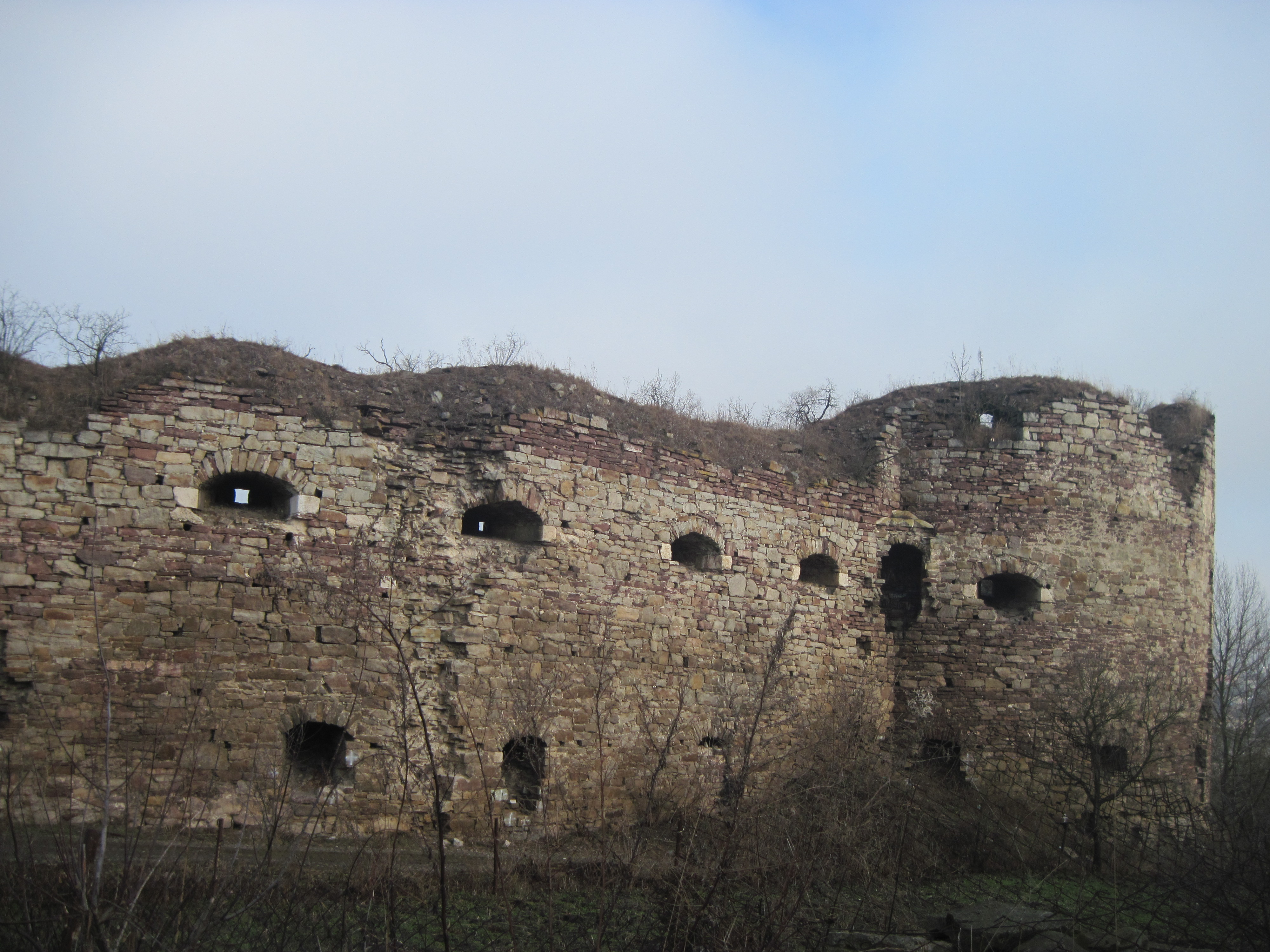 Бучацький замок, 2015